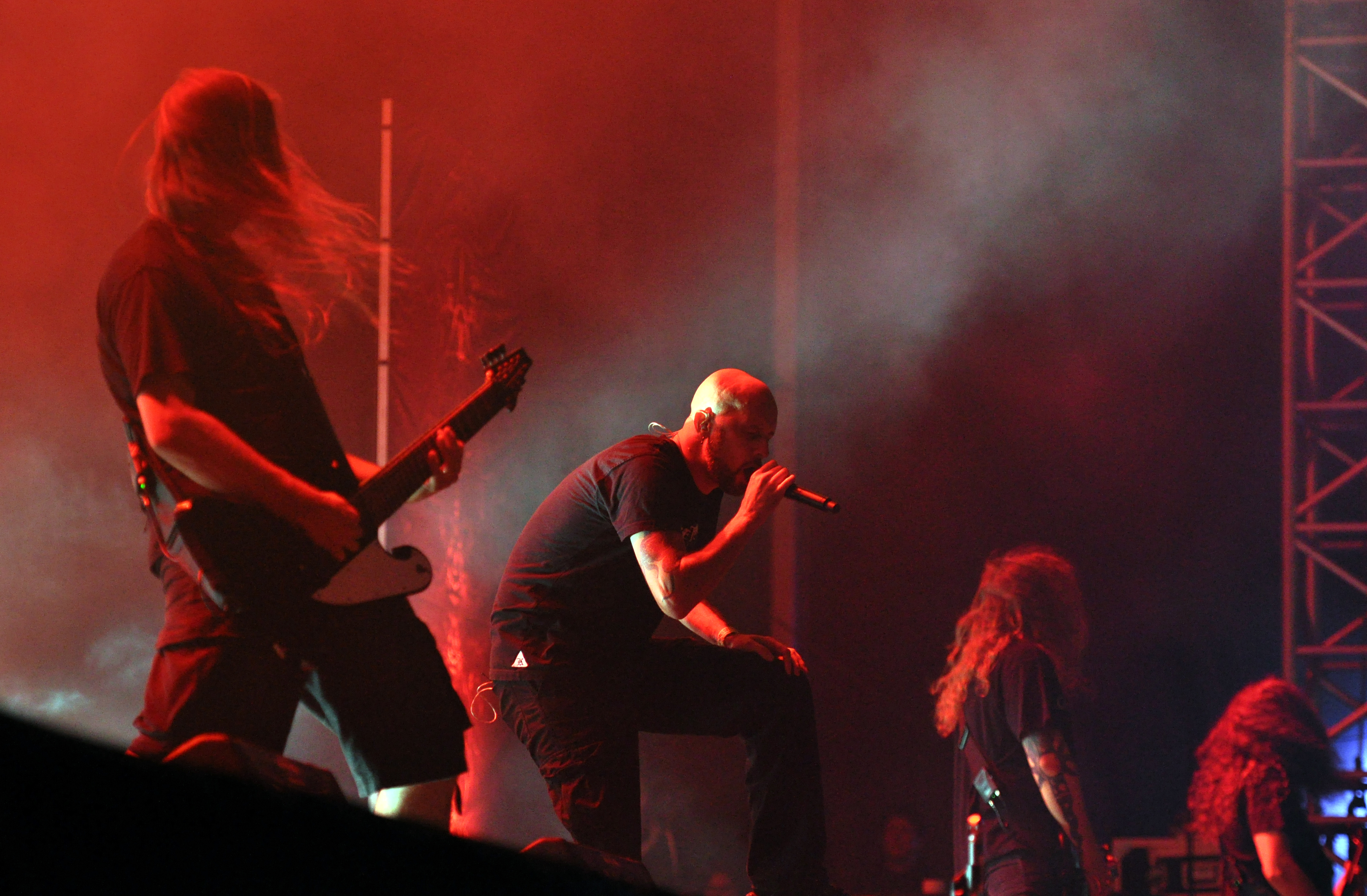 Meshuggah at Wacken Open Air 2013